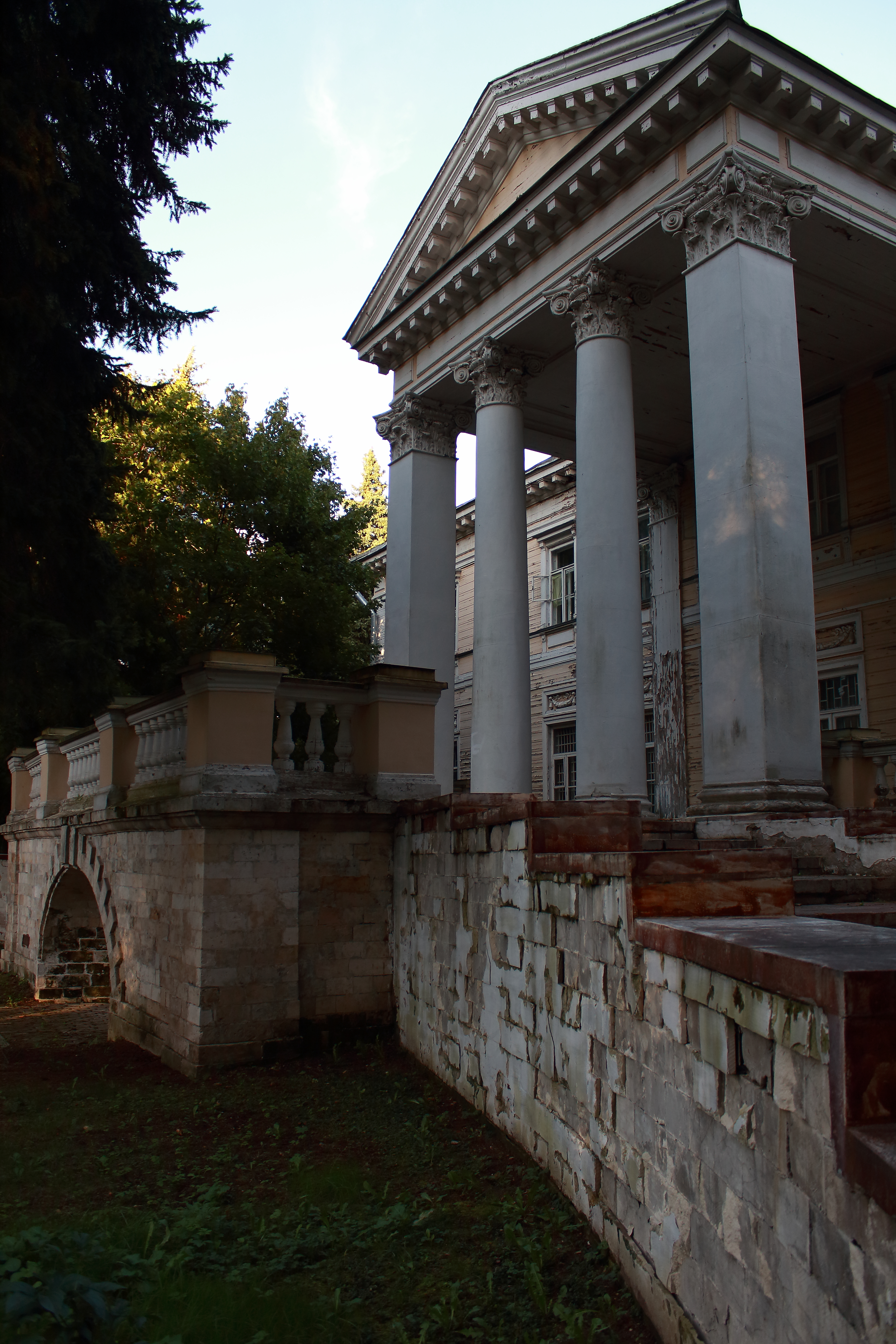 Главный дом: Профсоюзная ул., дом 123А, строение 15, Ясенево, Юго-Западный округ, Москва